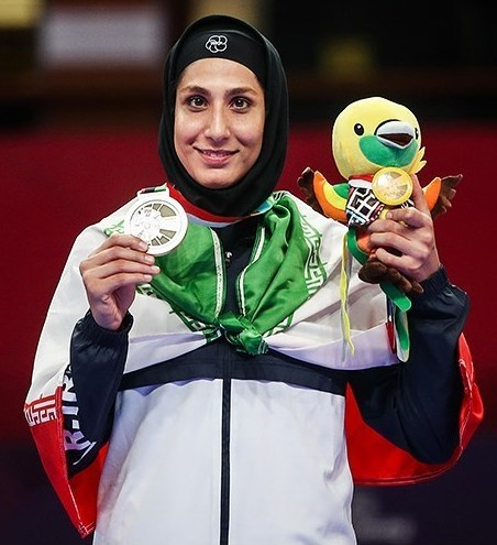 حمیده عباسعلی در مسابقه رده‌بندی کاراته بازی‌های آسیایی ۲۰۱۸